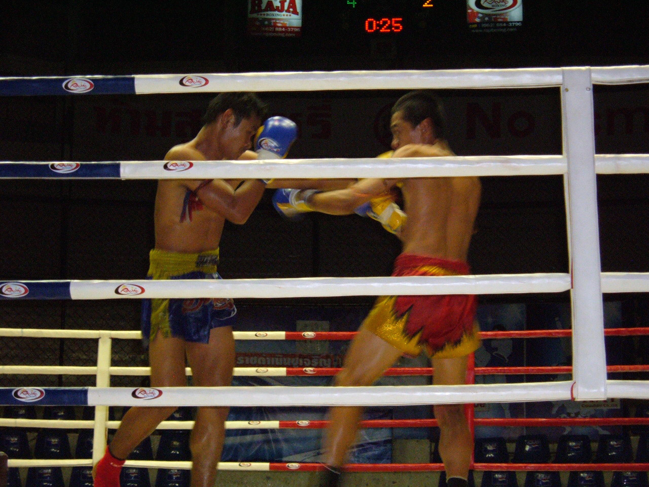 A Muay Thai match at Rajadamnern Stadium in Bangkok, Thailand.